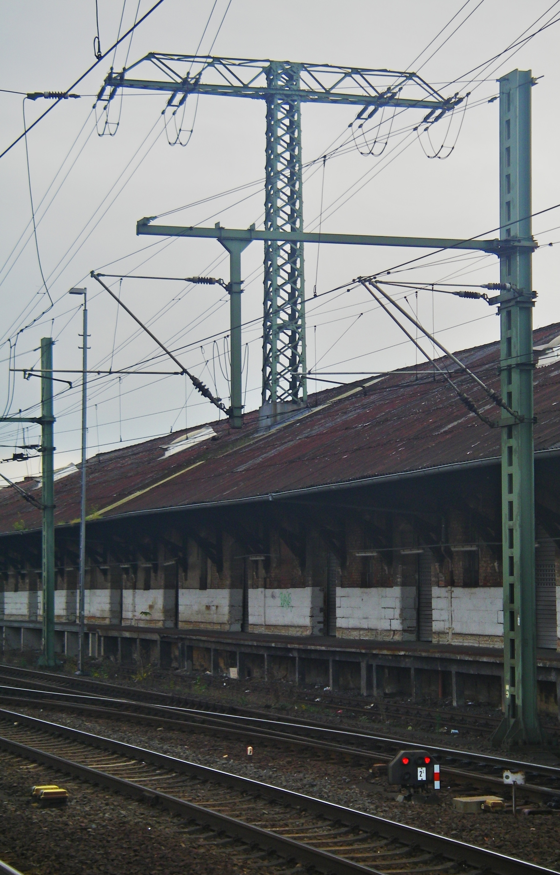 110 kV Bahnstrom-Leitungsmast auf einem Lagerschuppen im Bahnhof von Fulda